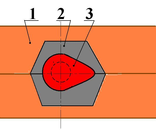 Schéma de principe de traitement de trempe superficielle des cames sur refroidisseurs au moment de la coulée.